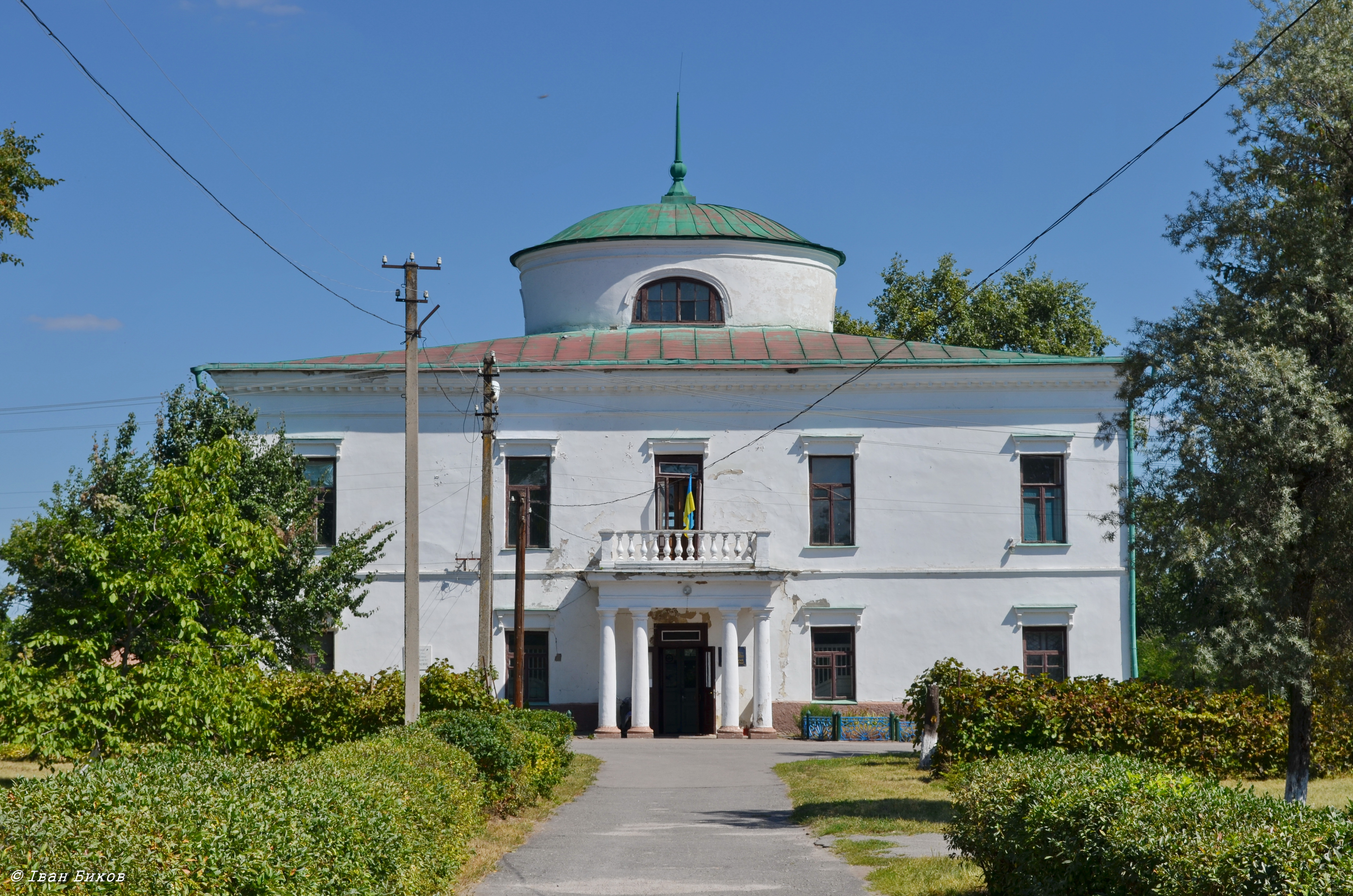 Садибний будинок (мур.), с. Вишняки